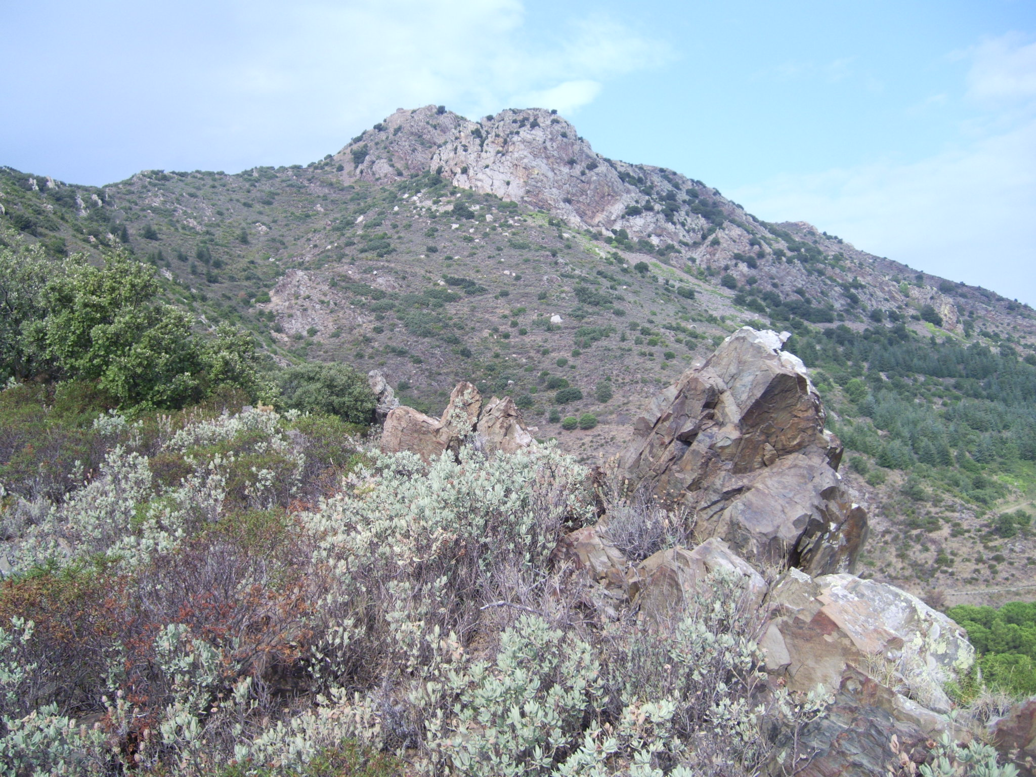 Vista del Querroig